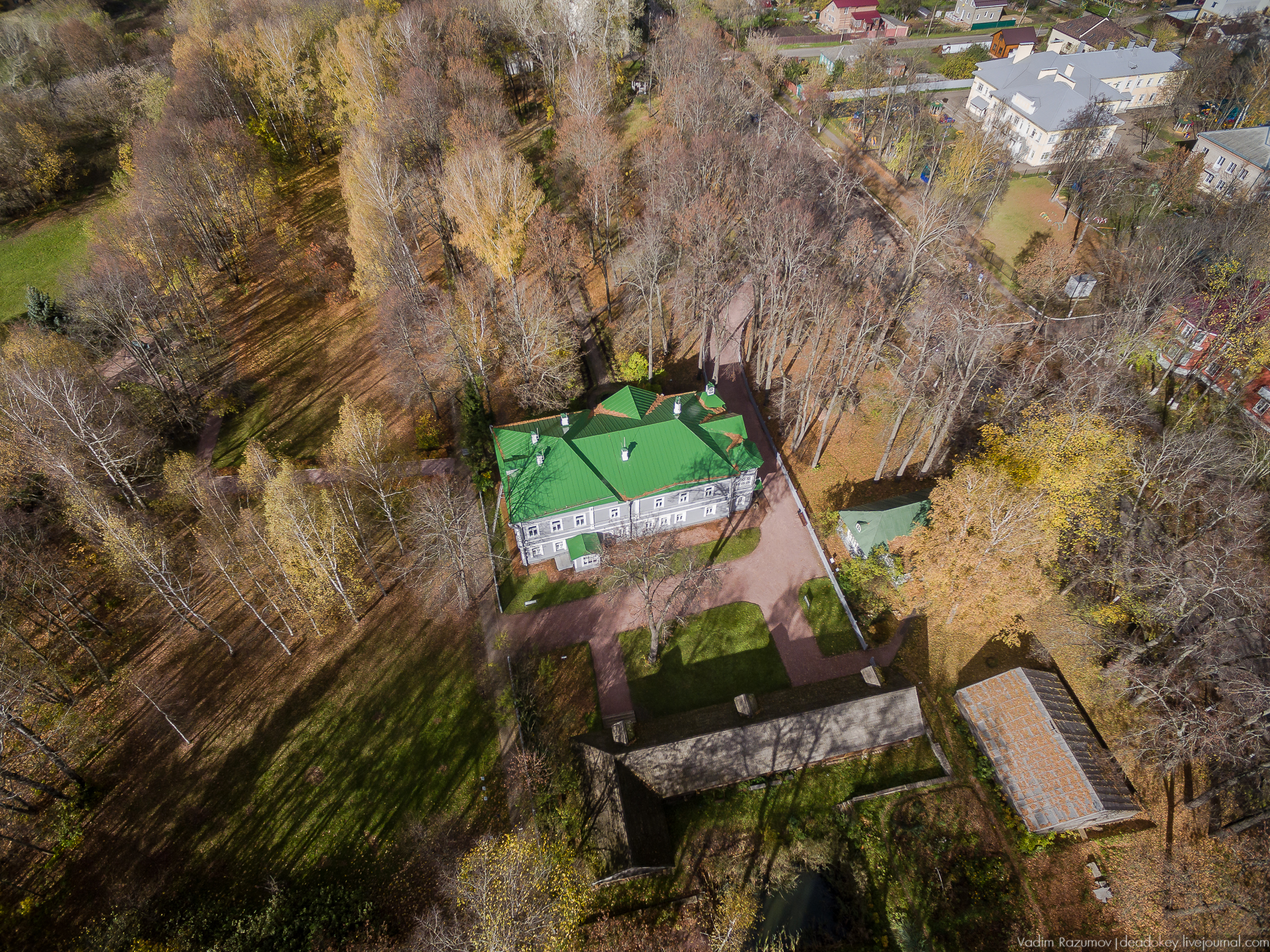 Усадьба городская: улица Чайковского, 48, Клин, Клинский район, Московская область. Дом композитора является первым мемориальным музеем в нашей стране. В Клину Чайковский написал увертюру «Гамлет», Пятую симфонию, балет «Спящая красавица», оперу «Пиковая дама» и балет «Щелкунчик». В этом доме П.И. Чайковский жил с мая 1892 г. по 1893 г.